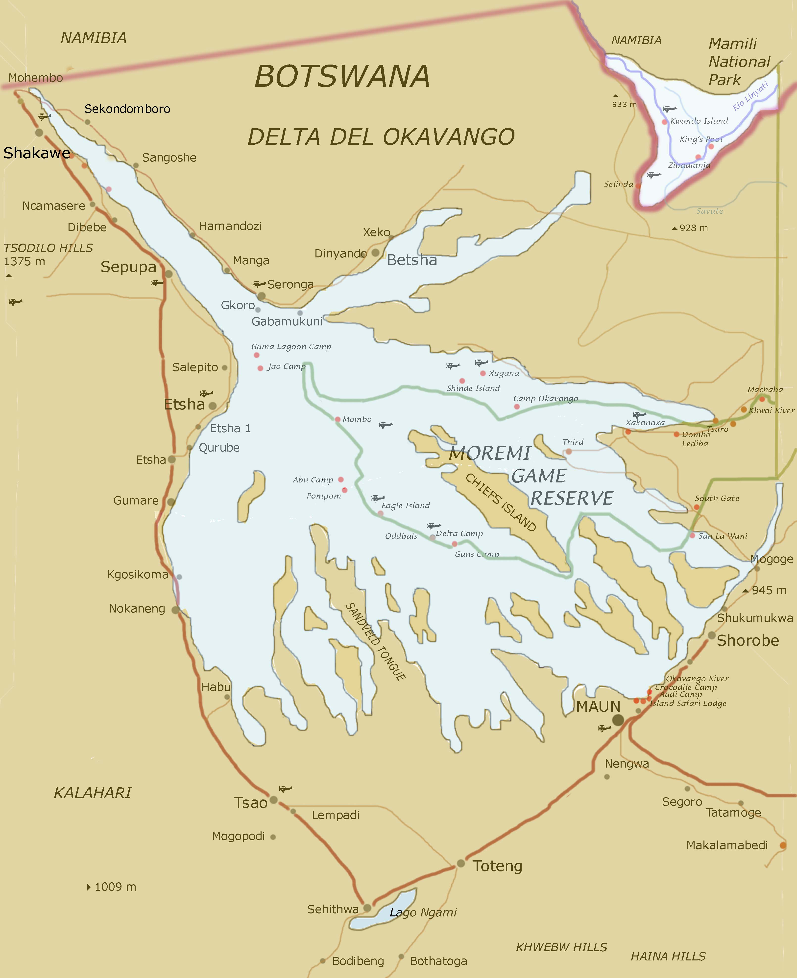 Mapa del Okavango realizado por al autor con Photoshop.